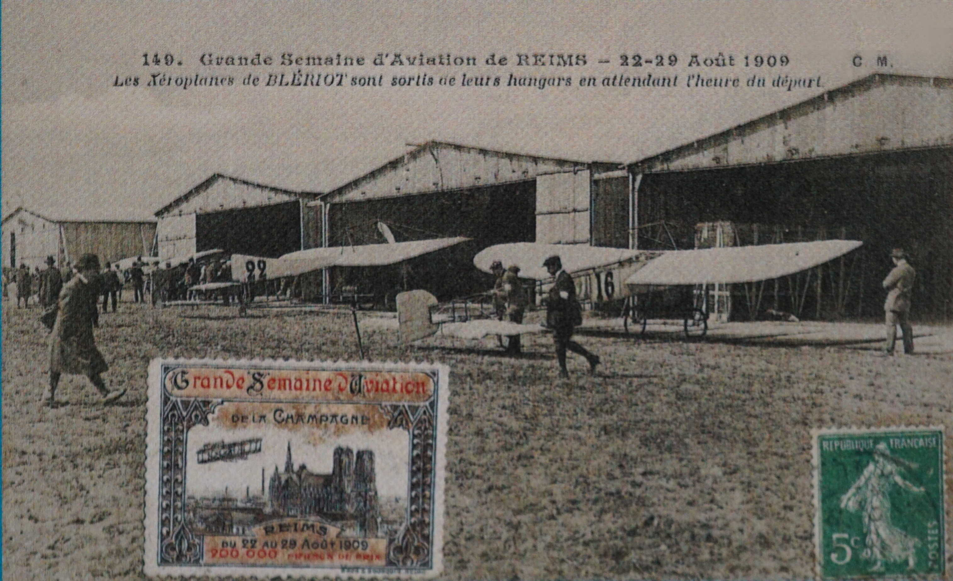 vue de cf. titre.